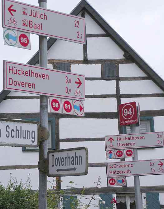 Fahrradwegweiser in Doverhahn